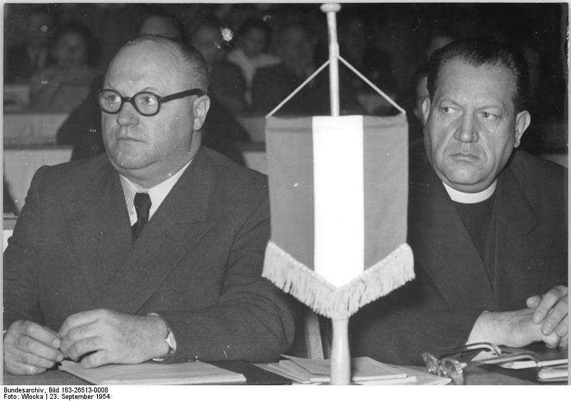 Zentralbild-TBD-Wlocka 2462 Zi-Ho. 10 Motive 23.9.1954 7. Parteitag der CDU in Weimar - 21. bis 25.9.1954 Am Mittwoch, den 22.9.1954, wurde in der Weimarhalle in Weimar, der 7. Parteitag der CDU unter Teilnahme zahlreicher Delegationen aus dem volksdemokratischen Ländern und dem kapitalistischen Ausland eröffnet. UBz: Prof. Josef Debretsberger, Vorsitzender der Demokratischen Union Österreichs (links) und Dr. Josef Plojhar, Minister für Gesundheitswesen und Vorsitzender der tschechoslowakischen Volkspartei.